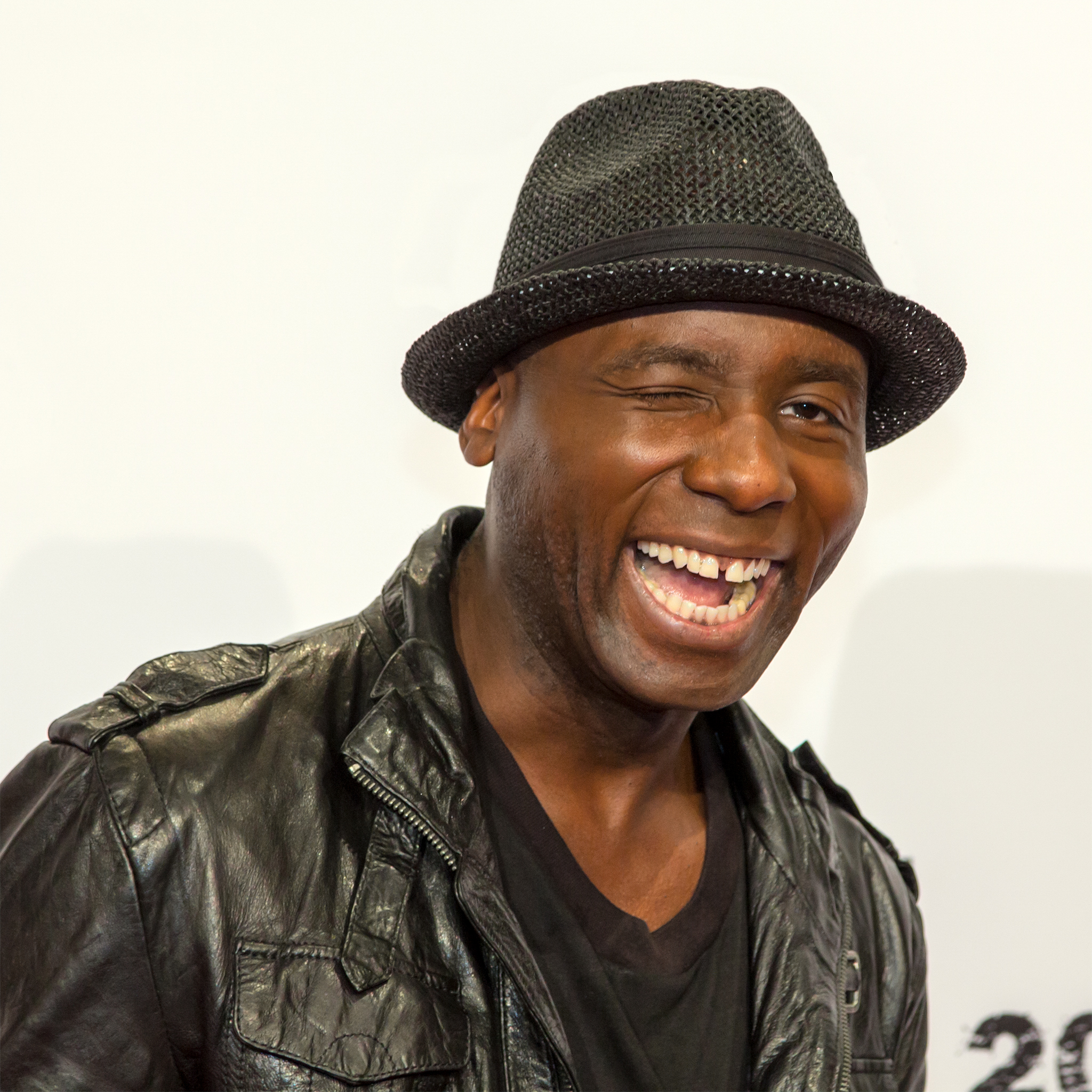 1LIVE Krone 2013: Dave Davis auf dem roten Teppich